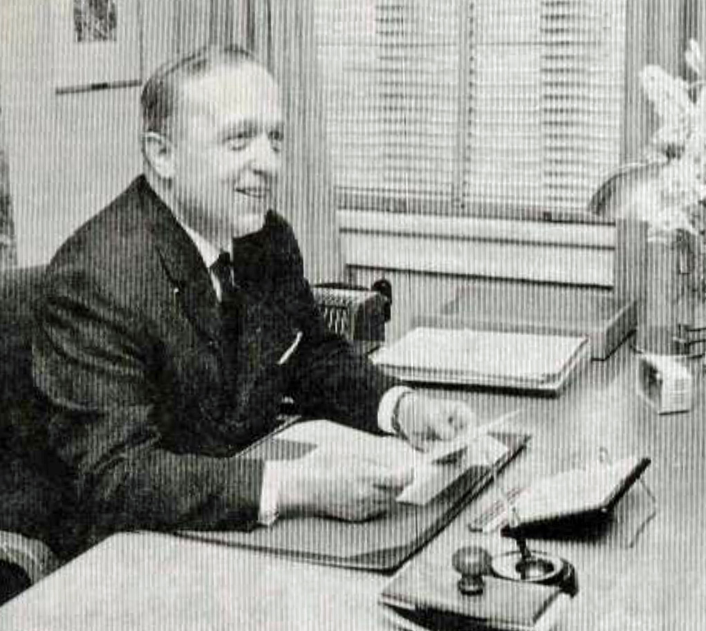 Väinö J. Leino, Turun kaupunginjohtaja 1964–1989